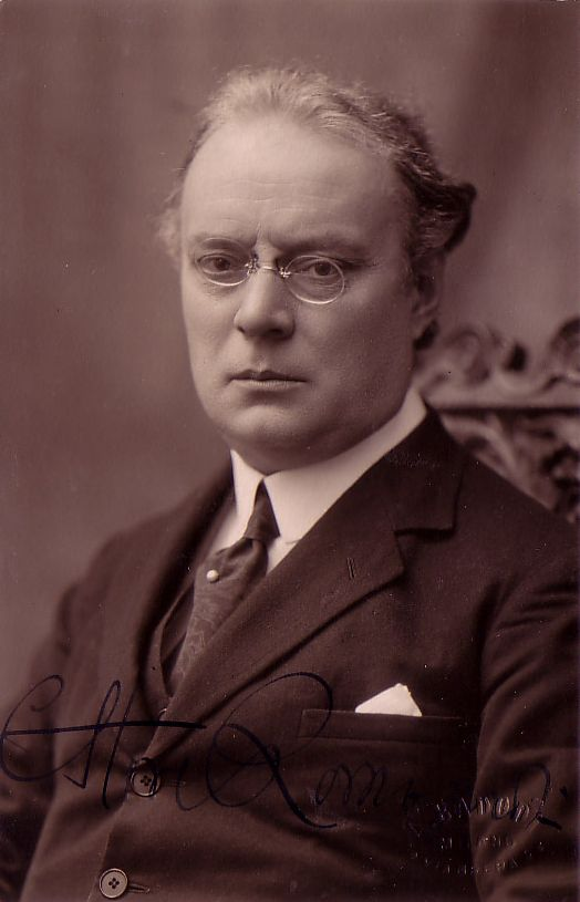 Foto di Ettore Romagnoli, (1871 – 1938), grecista italiano